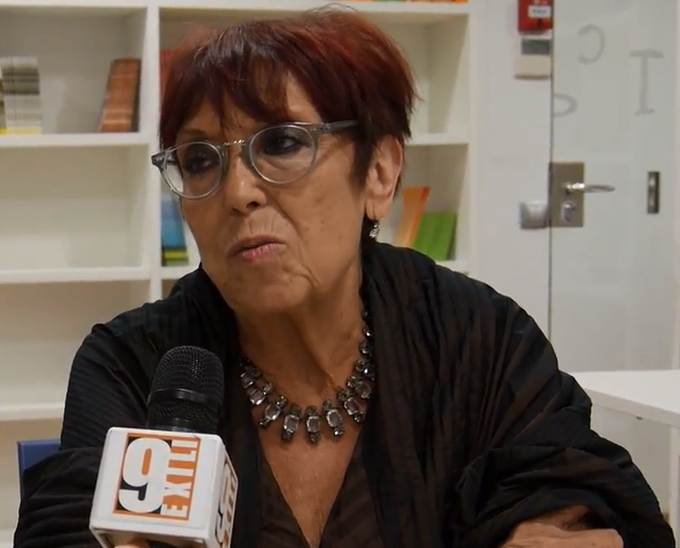 Entrevista a Maruja Torres. El Centre Cultural de Picanya ple de gom a gom acollia l'acte de lliurament del premi Llig Picanya 2013 a l'escriptora Maruja Torres , enmarcat dins els actes del Maig Literari. Passava per ací i va voler abocar-se a la finestra de 9exili per conversar de periodisme i de cultura. Amb mirada crítica , sense pèls en la llengua , una vegada més , la Torres , Maruja ens convida a alçar la veu , a no callar ... a ser lliures Enhorabona pel premi i a prepareu-vos per vore i escoltar Maruja Torres en estat pur